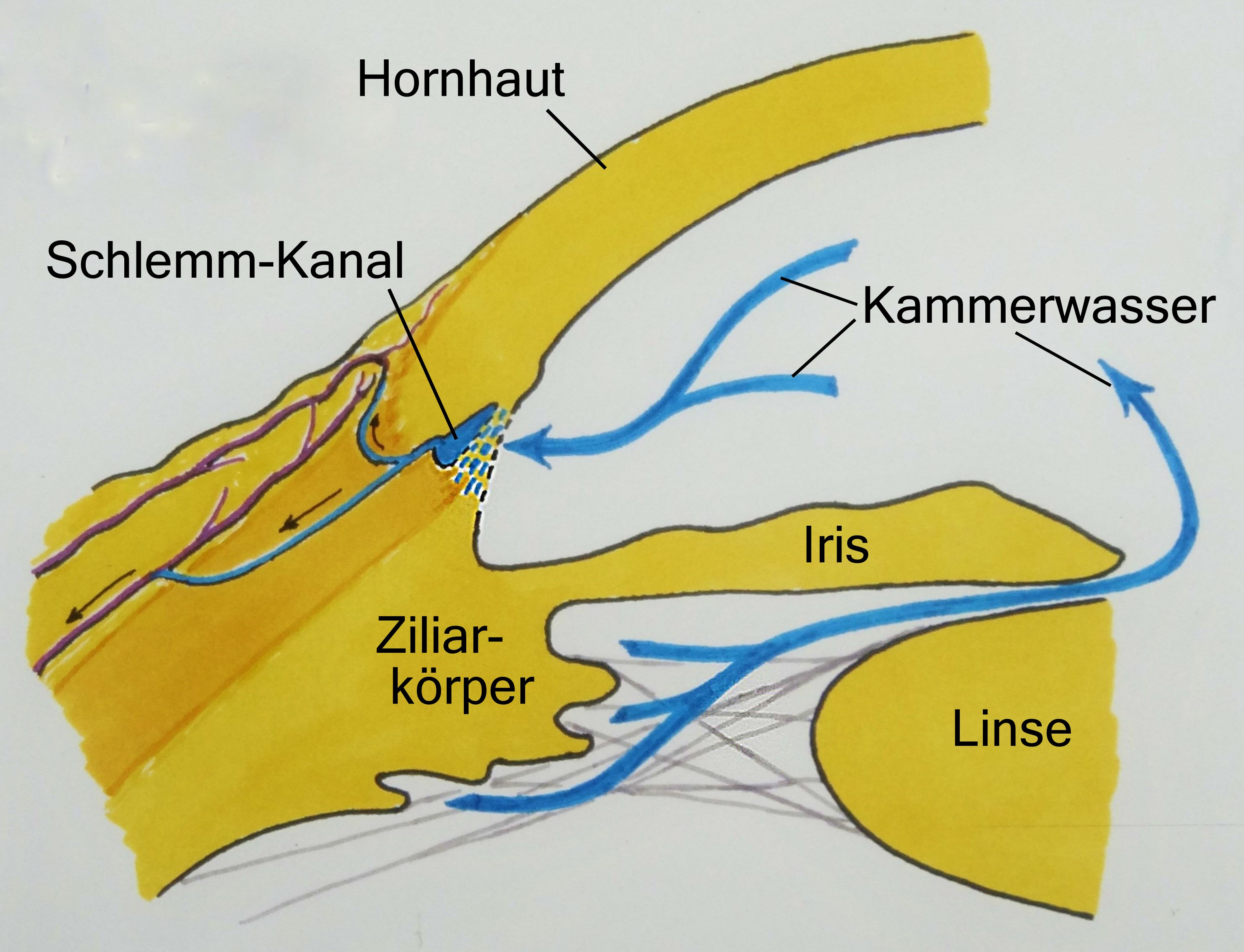 Schema des Kammerwasser-Kreislaufs im Auge